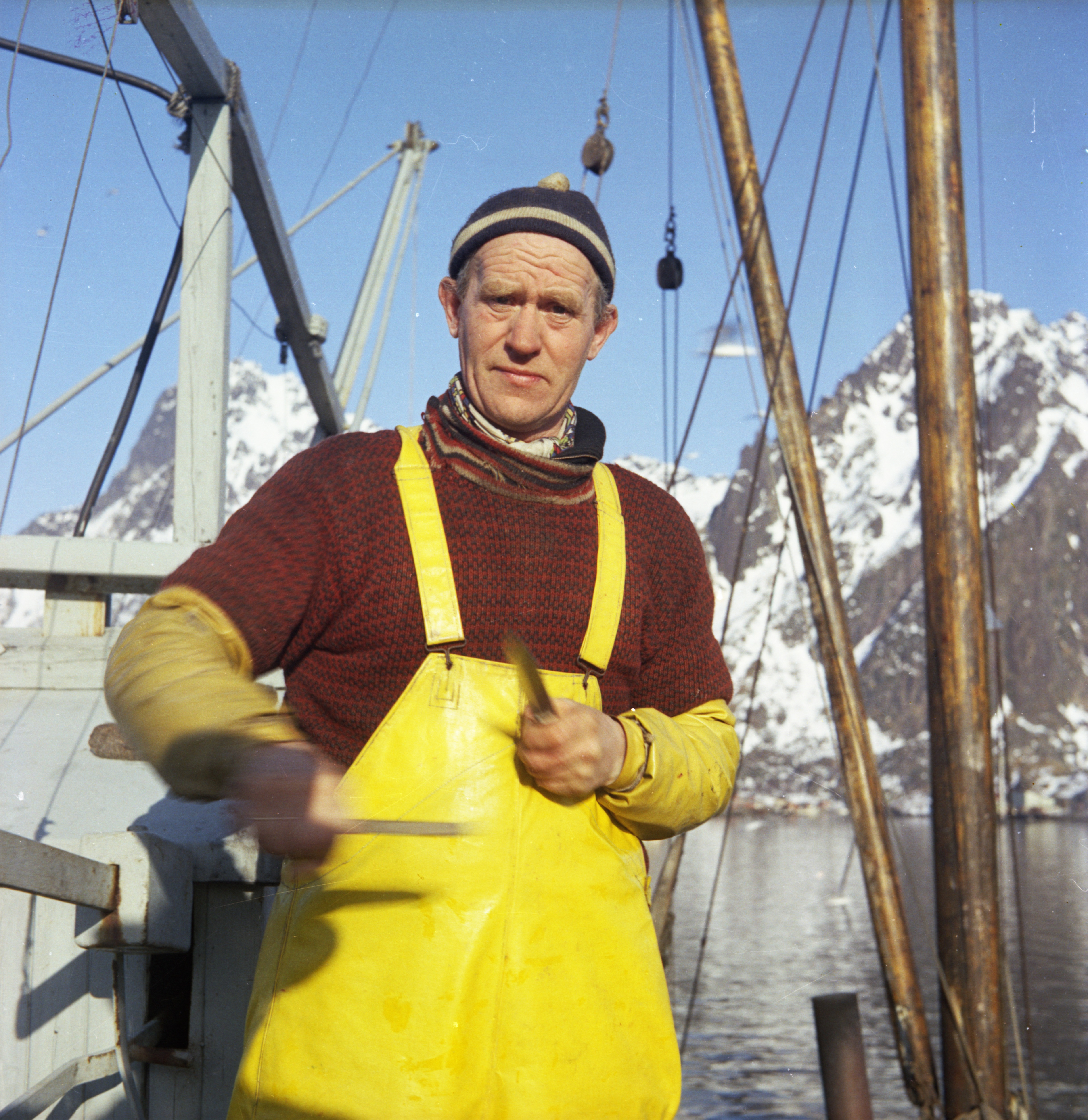 Bildet er hentet fra Nordlandsmuseet bildesamling etter Kanstad. Motivbeskrivelse: Fisker? Nøkkelord: Drakt, kroppsdel, hel drakt Eggverktøy Båter og fartøyer